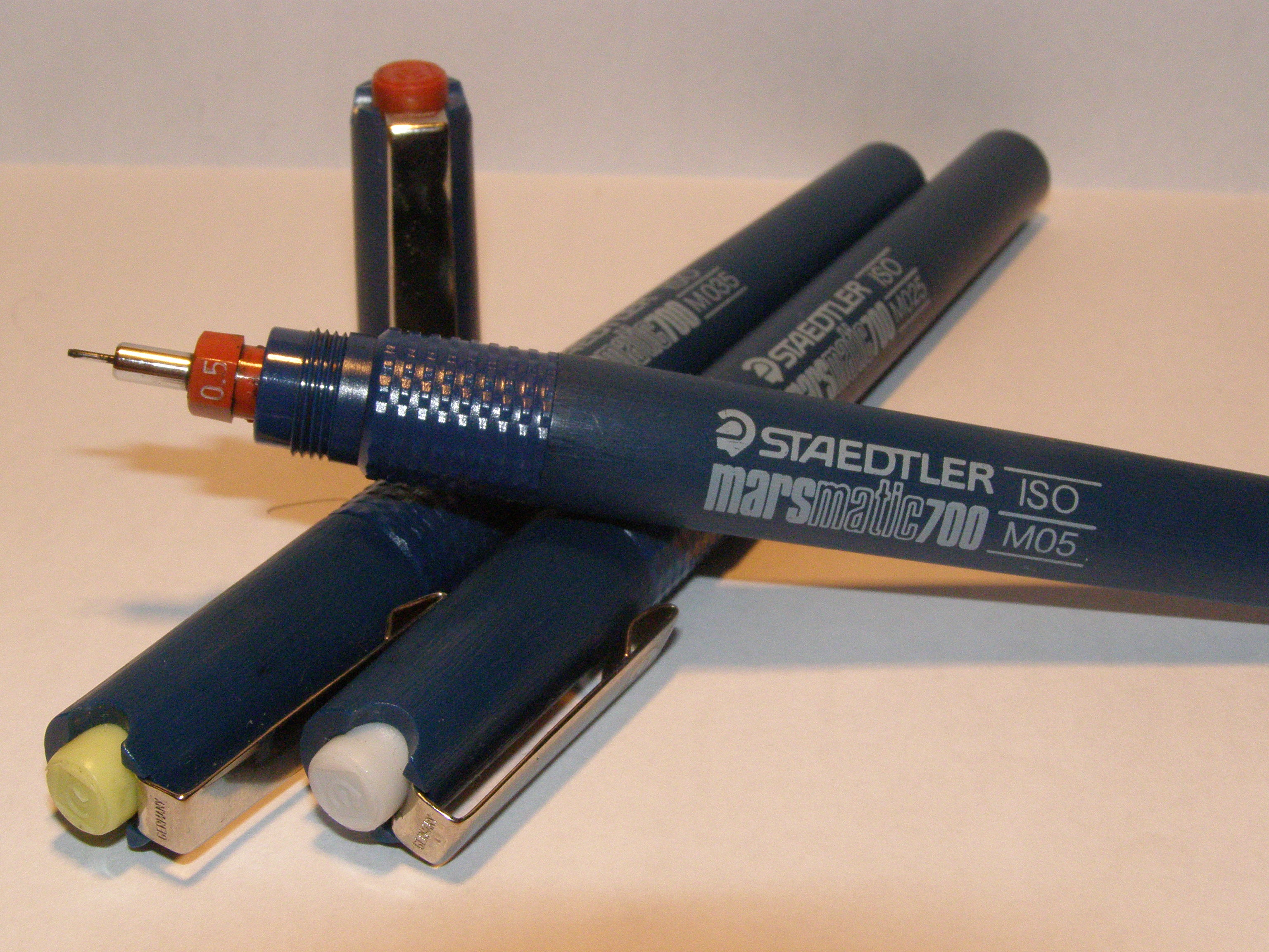 Staedtler Technical pens